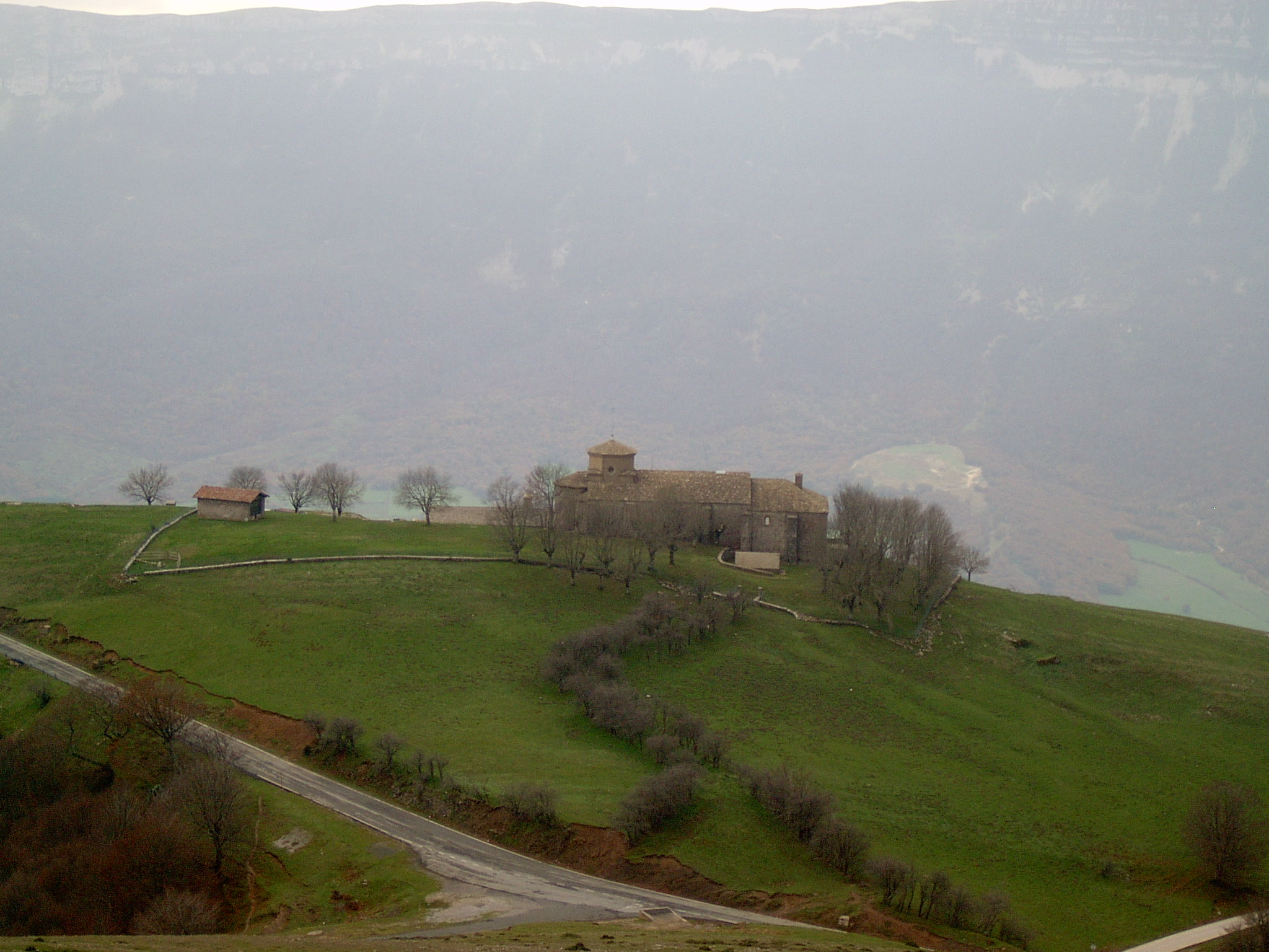 San Migel Aralarkoa santutegiaren ikuspegi orokorra Artxueta mendiaren magaletik ikusita. Aralar. Uharte-Arakil. Nafarroa, Euskal Herria.